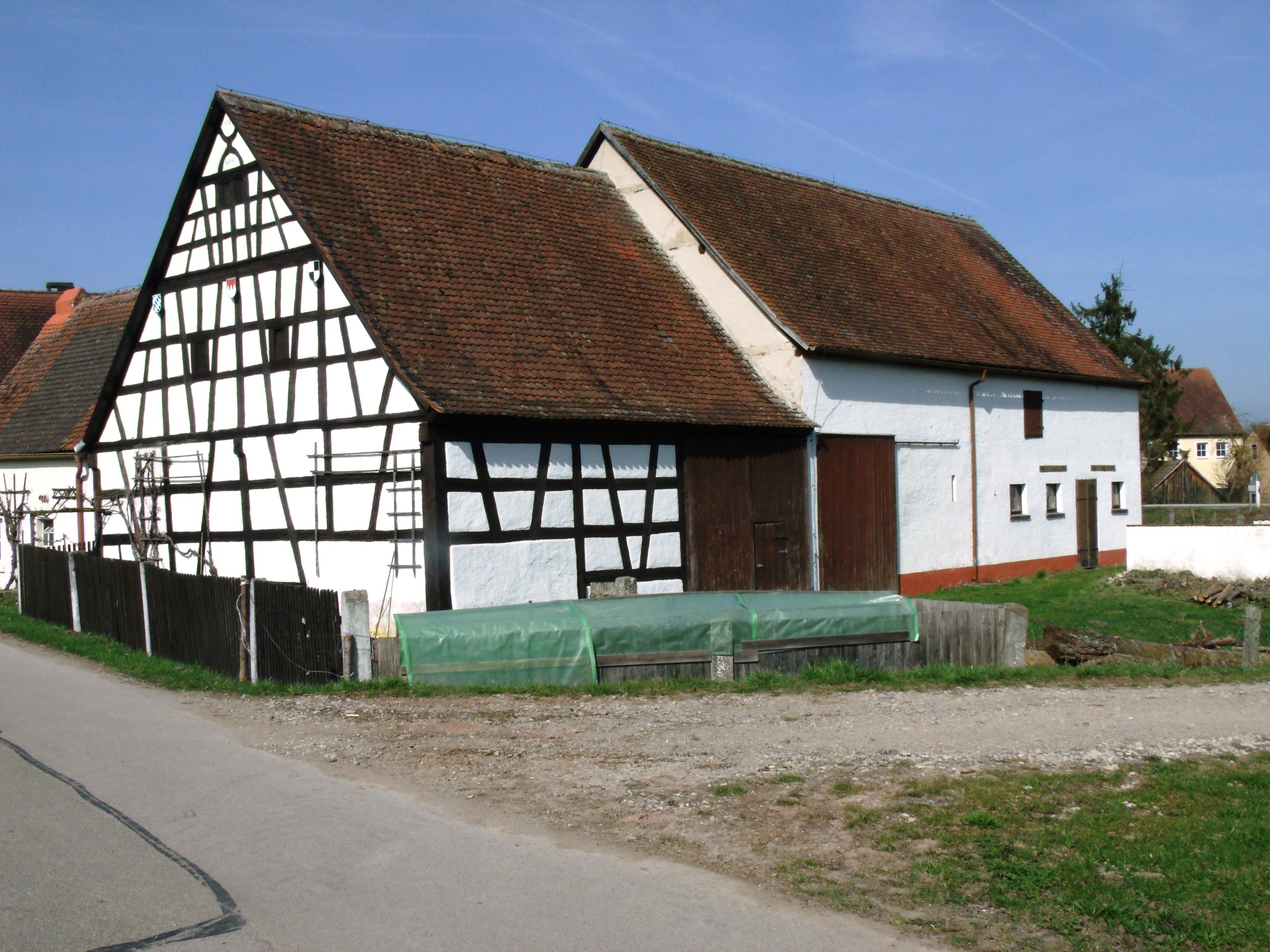 Hannenbach, Ortsteil von Leutershausen im Landkreis Ansbach, Fachwerkscheune